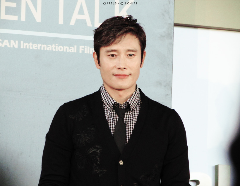 161007 부산국제영화제 오픈토크.